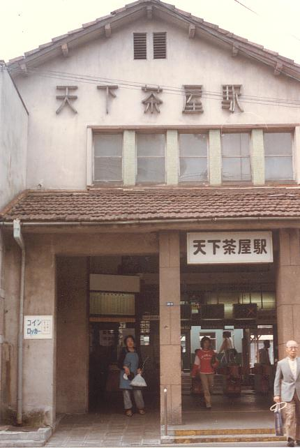 高架化以前の天下茶屋駅駅舎